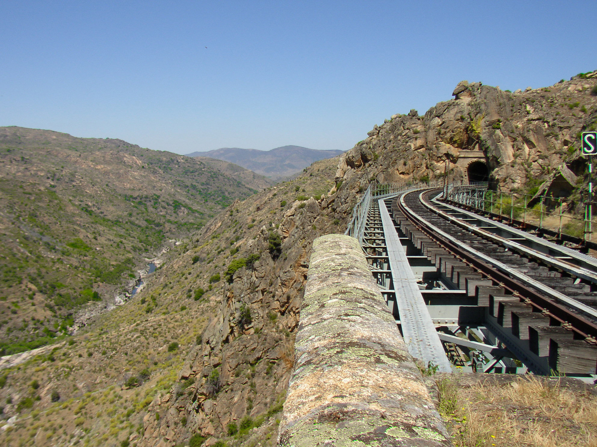 Línea La Fuente San Esteban – La Fregeneda – Barça d’Alva. Ruta de los túneles, entre la La Fregeneda y el muelle de Vega de Terrón.